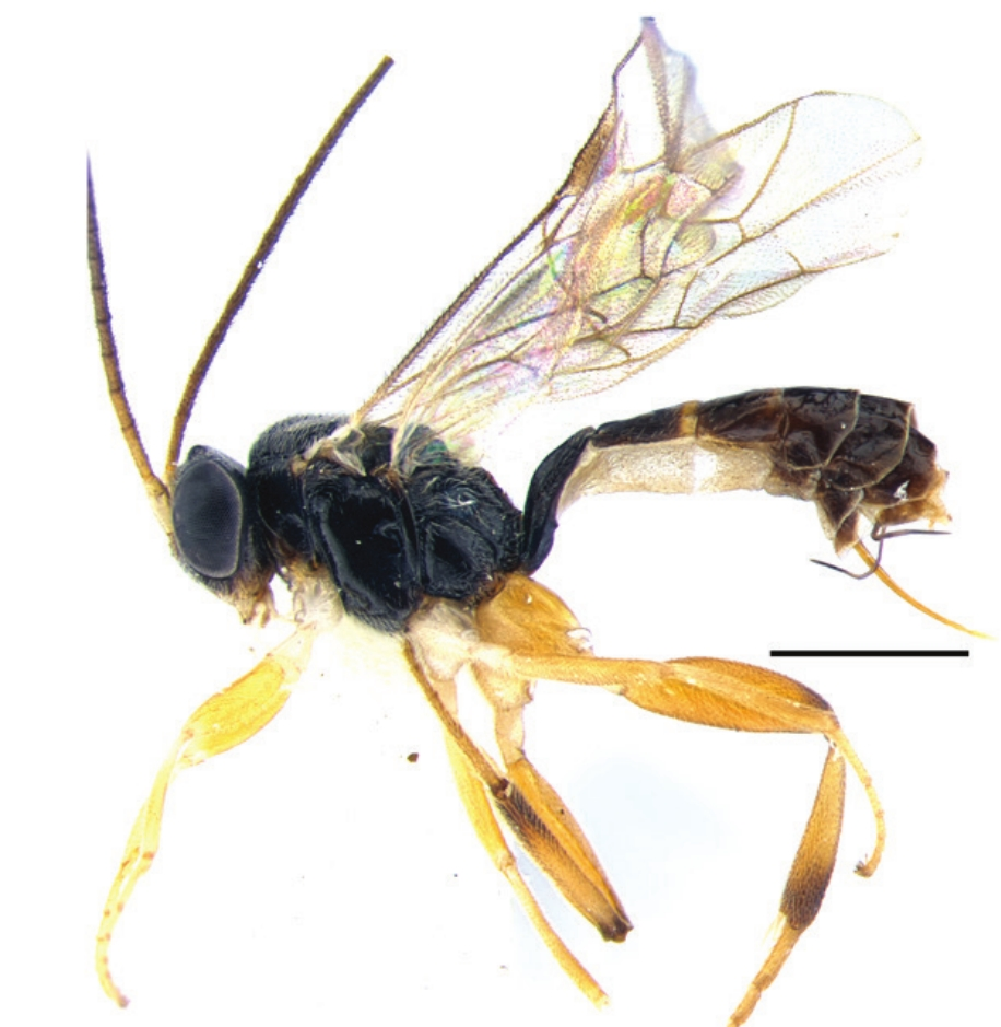 Schlupfwespe der Art Gnathocoris flavipes Förster, 1871; Orthocentrinae. Habitus von lateral, Sammlungspräparat, Maßbalken: 1mm.